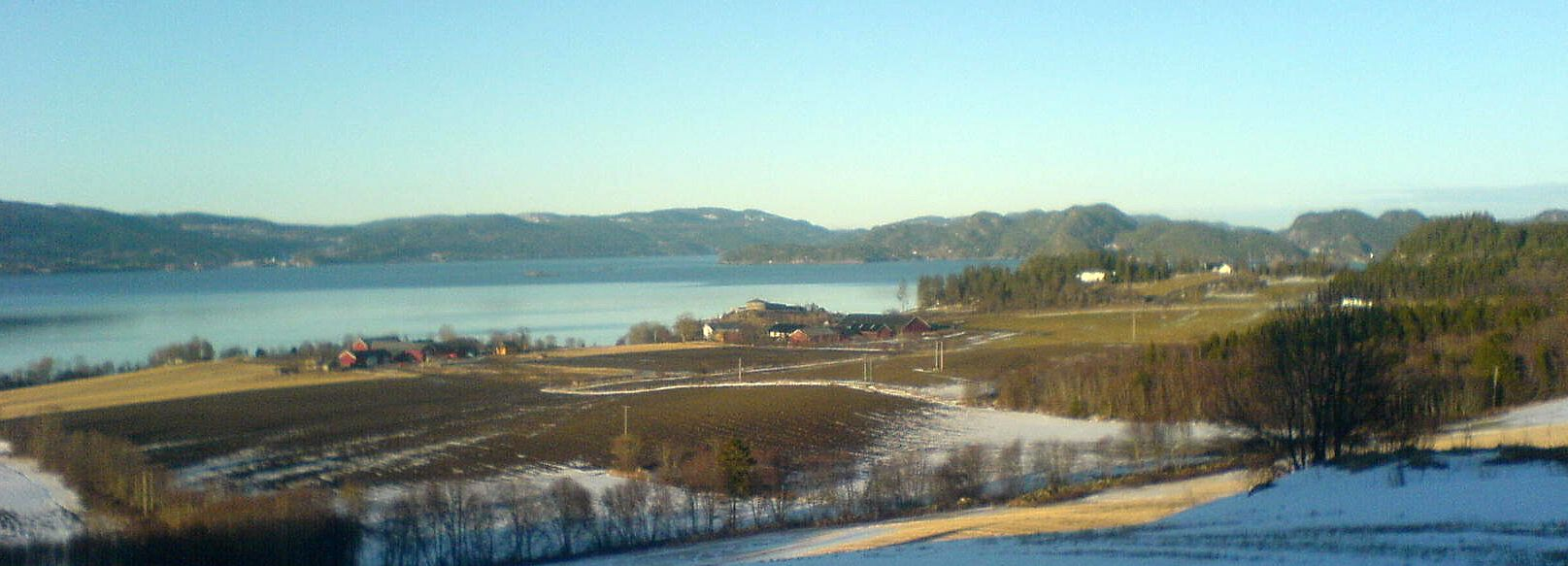 Steinvik i bygda Skatval, med tatt fra Alstad, med utsikt mot Steinvikholmen og Åsenfjord (med Frosta og Åsen)